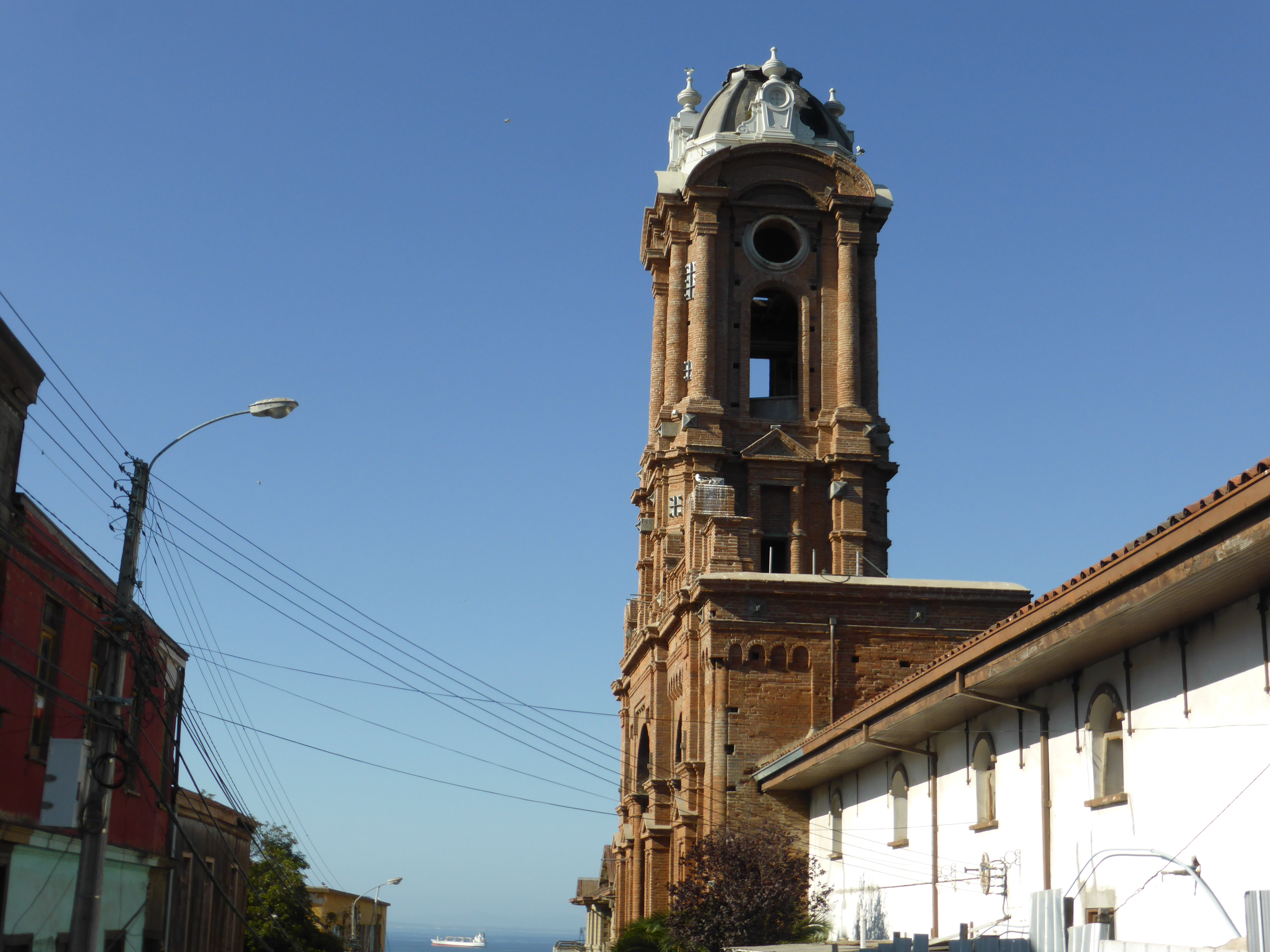 Torre neobarroca de ladrillo -construida hacia 1893- dañada tras el último incendio de 2013. Monumento Histórico. Calle Blanco Viel 572.